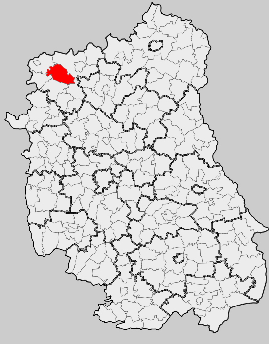 Map of gmina Stanin, Łuków county, Lublin voivodship Mapa gminy Stanin, powiat łukowski, województwo lubelskie